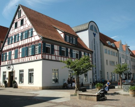 Geschäftsstelle in Kirchheim